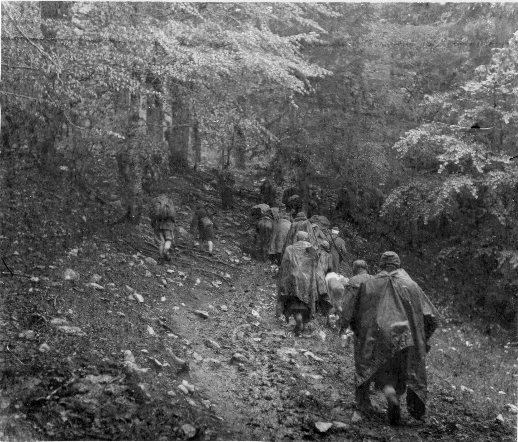 Srpskohrvatski / српскохрватски: Pokret boraca Četvrte crnogorske brigade prema Miljevini, u vreme bitke na Sutjesci 12. juna 1943.